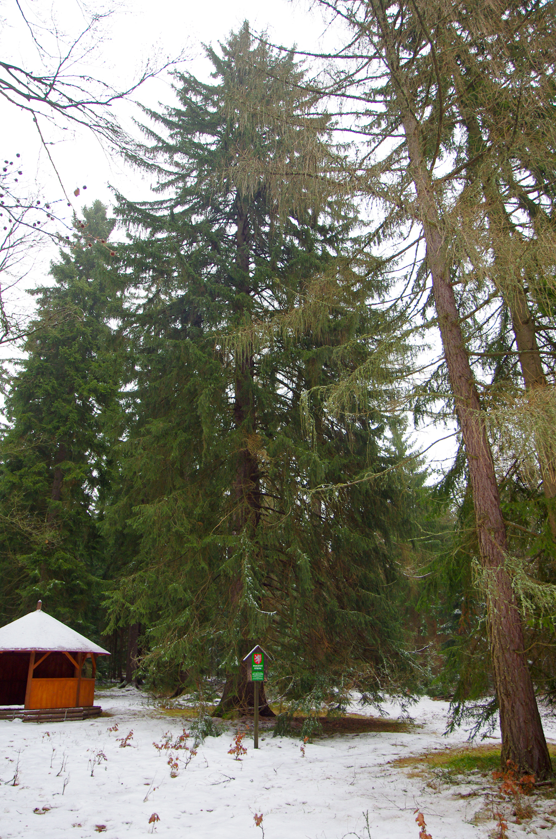 Šindelová, Krušné hory, smrk u kříže za loveckým zámečkem Favorit, památný strom na loučce u kamenného kříže vlevo od cesty od Šindelové, cca 400 severně od zámečku, mimořádně silný, solitérní, nízko zavětvený smrk, roste v blízkosti kříze spolu s velkým dubem a starými buky, výška 37 m, obvod kmene 375 cm (údaje z roku 2004)